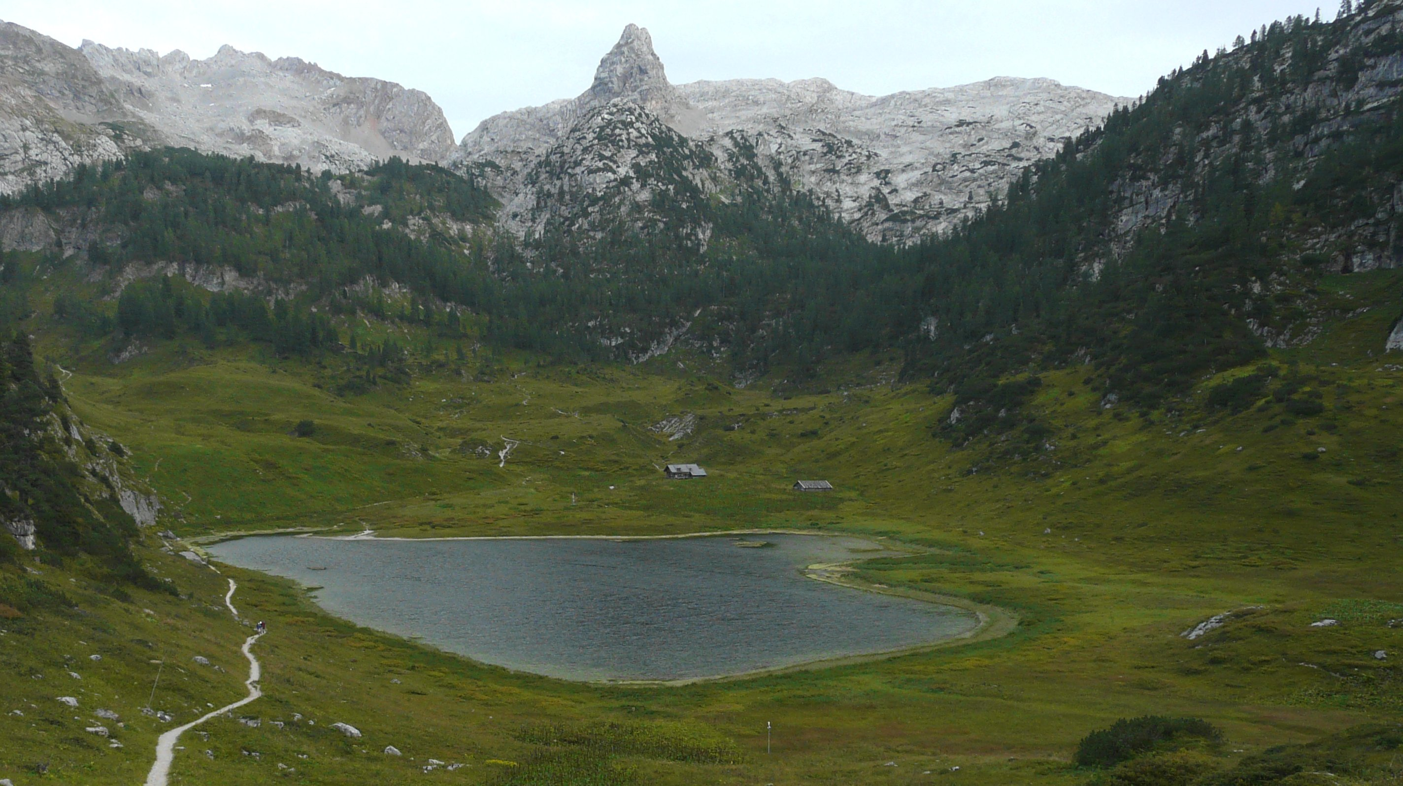 Der Talkessel des Funtensees in den Berchtesgadener Alpen